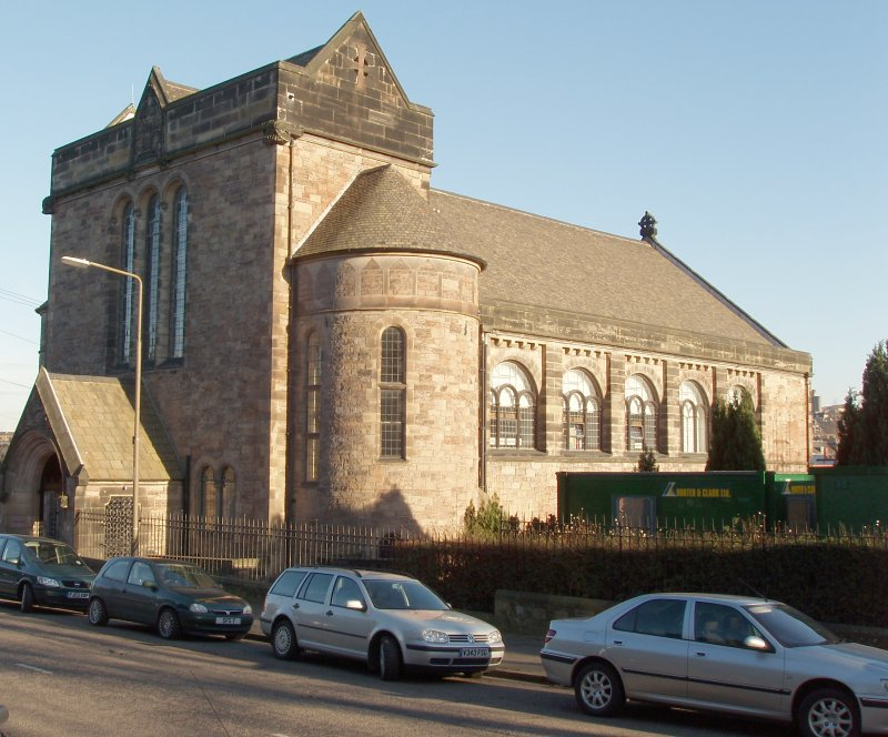 No longer a church, but at least it's still in good condition. Taken on Inverleith Terrace (en); Keine Kirche mehr, aber noch in gutem Zustand. Auf der anderen Straßenseite des Royal Botanic Gardens an der Inverleith Tce aufgenommen (de).